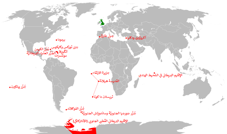 مواقع أقاليم ما وراء البحار البريطانيَّة (بِالأحمر)، ومُلحقات التاج (بِالأزرق)، وبريطانيا العُظمى و|إيرلندا الشماليَّة (بِالأخضر)